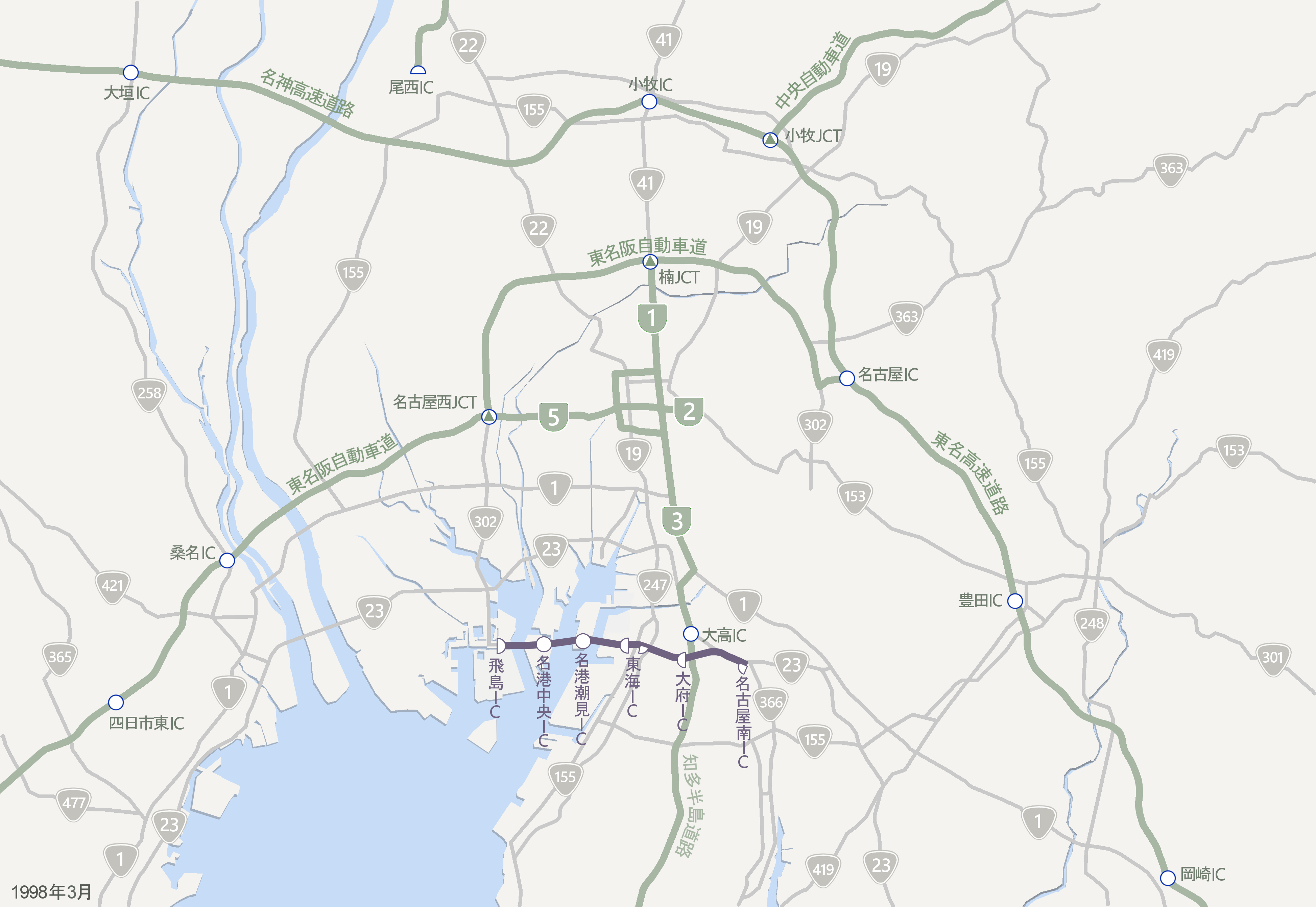 伊勢湾岸自動車道1998年3月時点